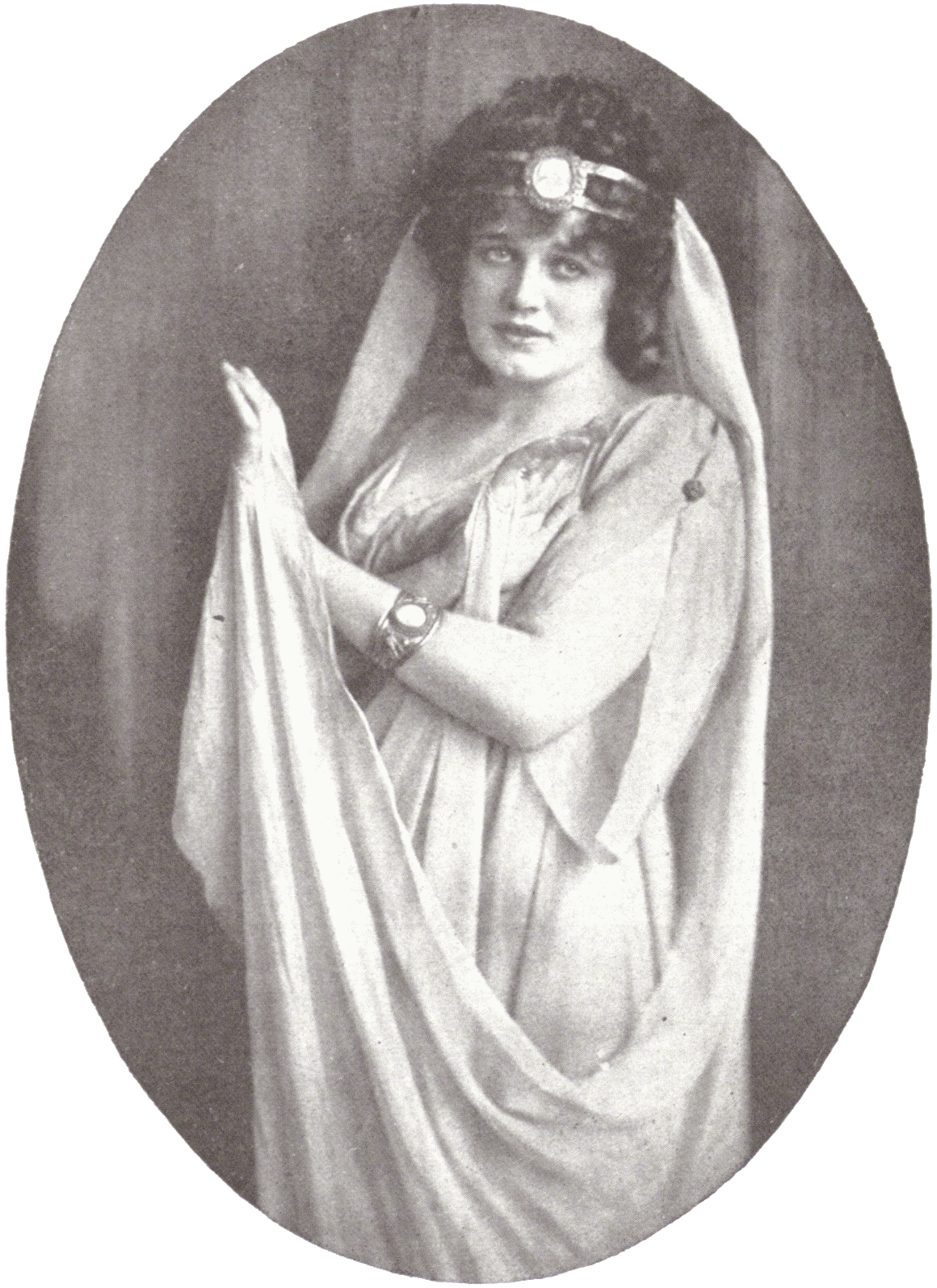 Maria Jeritza (1887–1982), Austrian vocalist